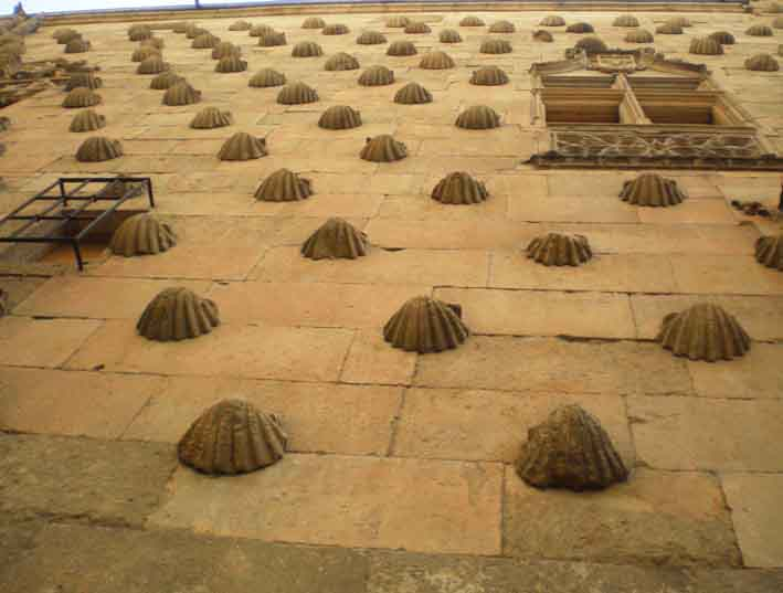 detalle de la casa de las conchas